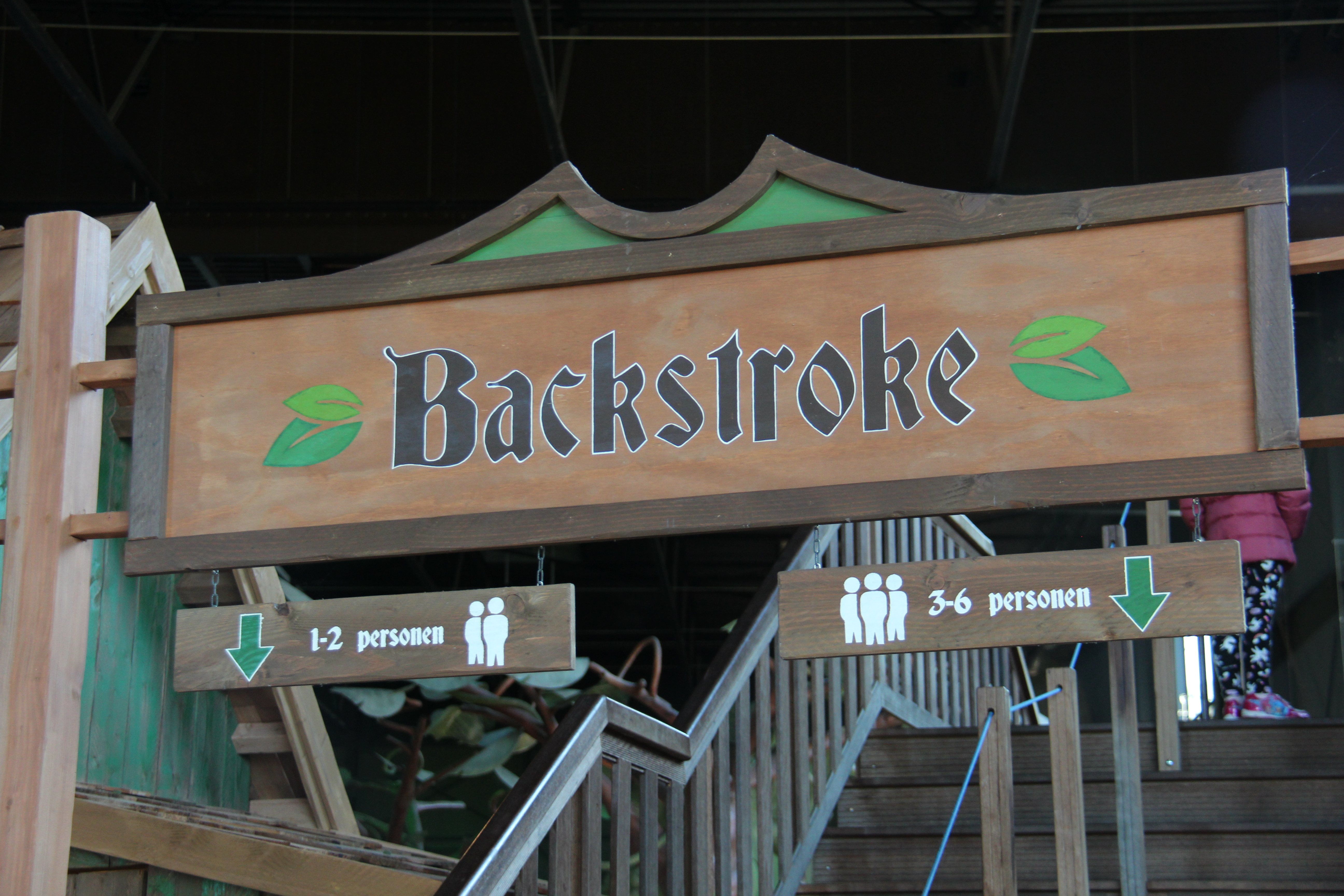 Het bord voor de ingang van Backstroke in Toverland